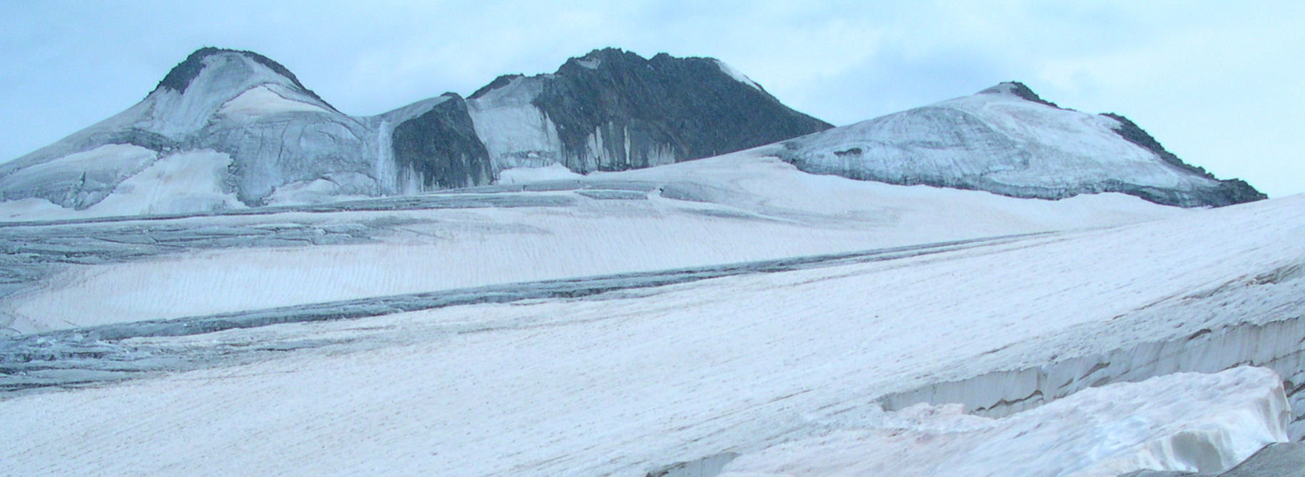 Zuckerhütl (left) and Pfaffenschneid (middle)